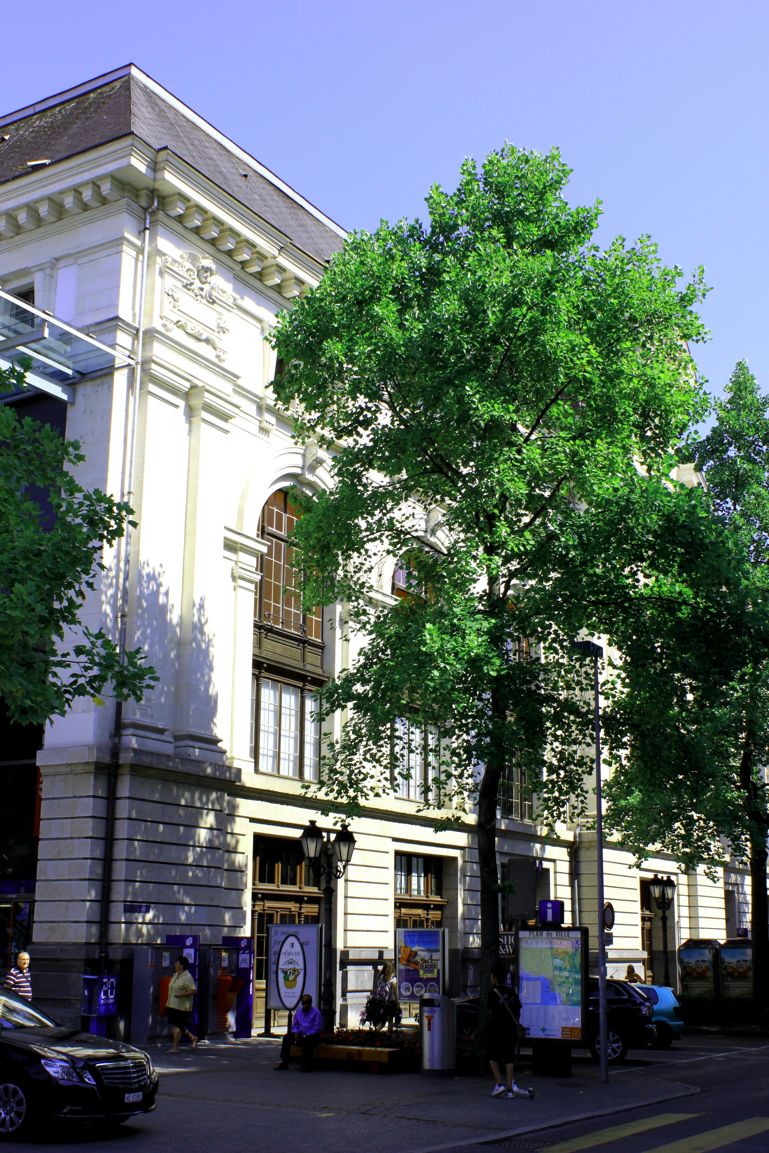 Suisse, canton de Vaud, Montreux, gare de Montreux.